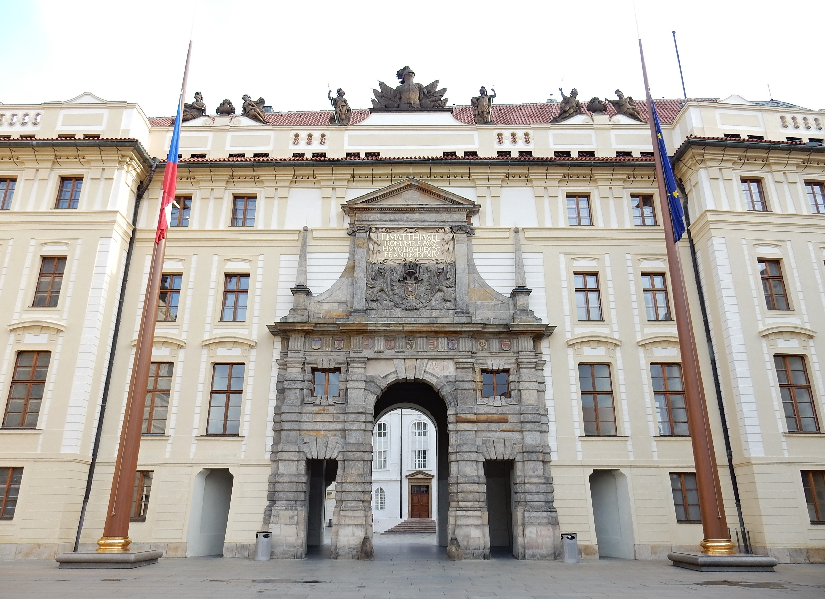 Praha - Hradčany - Pražský hrad - tzv. Matyášova brána na 1. nádvorí hradu